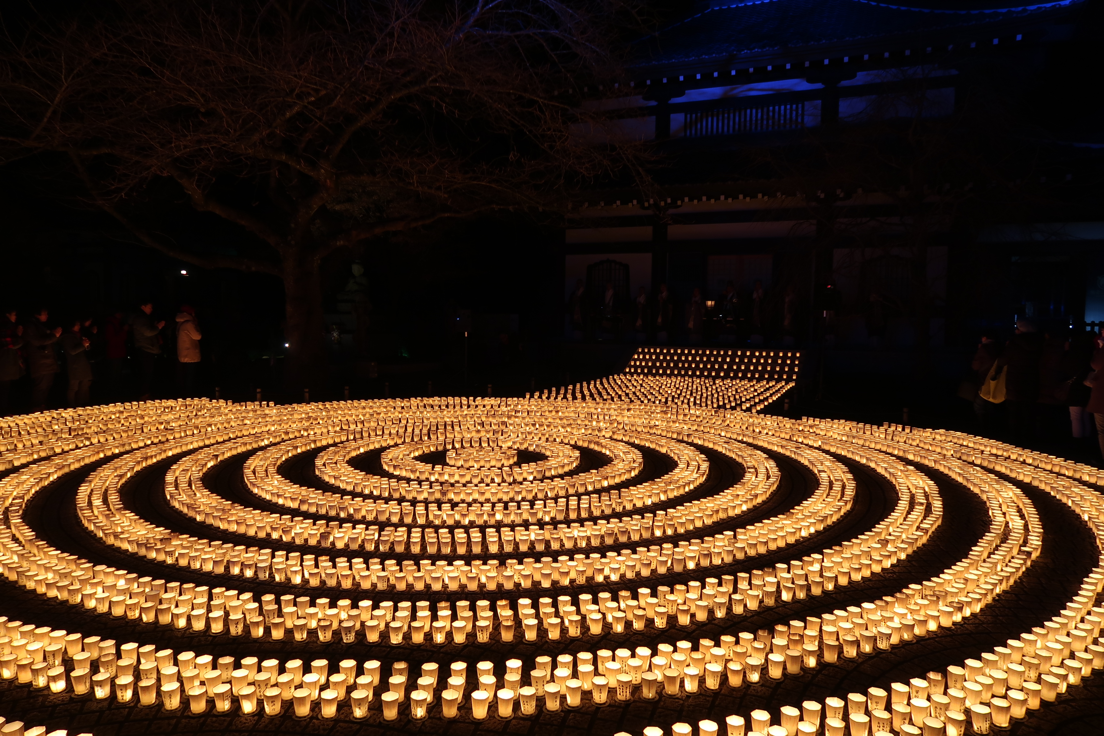 中文（台灣）: 位於神奈川縣鐮倉市長谷寺1月1日的萬燈祈願會